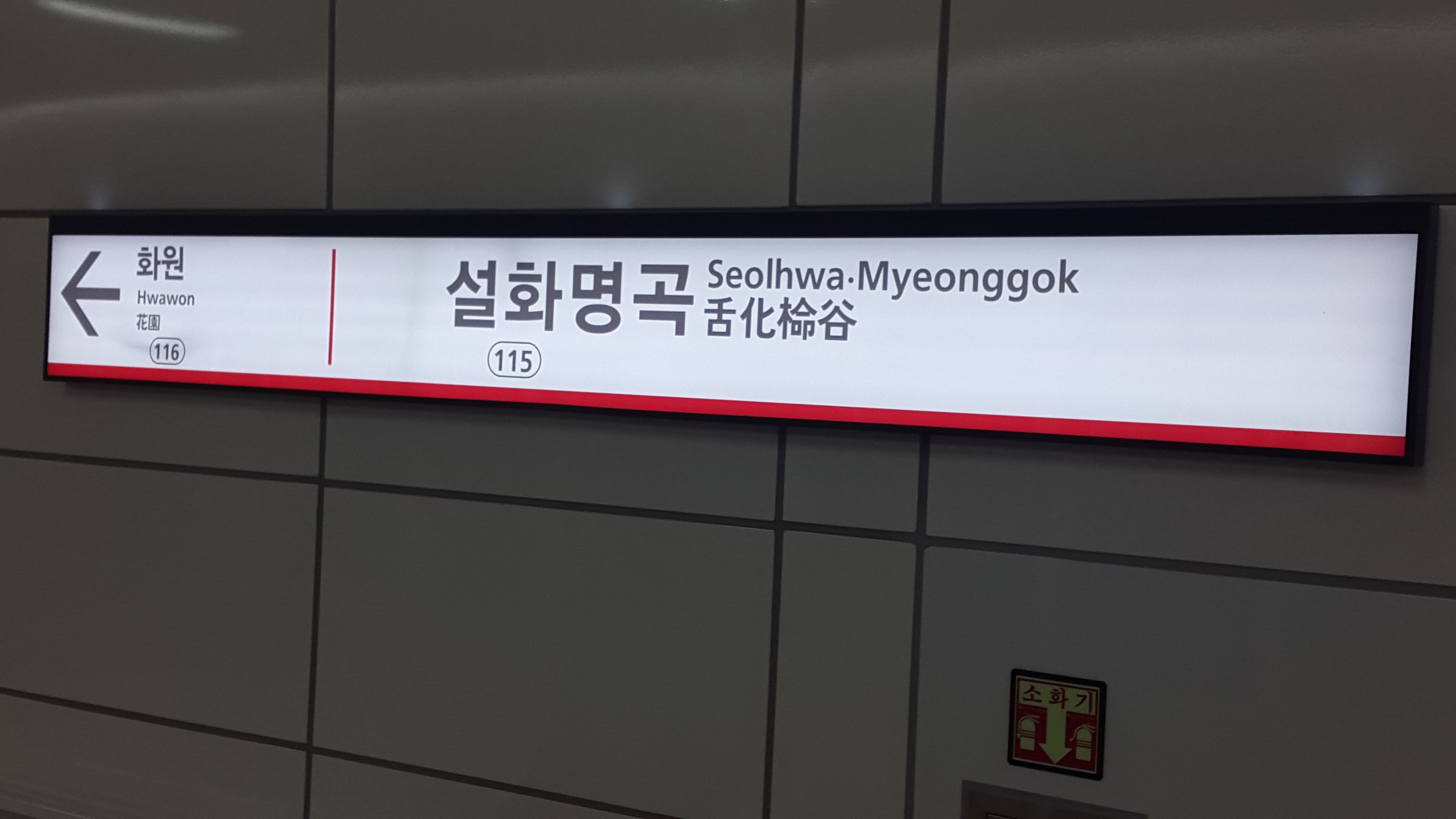 설화명곡역 폴사인 2